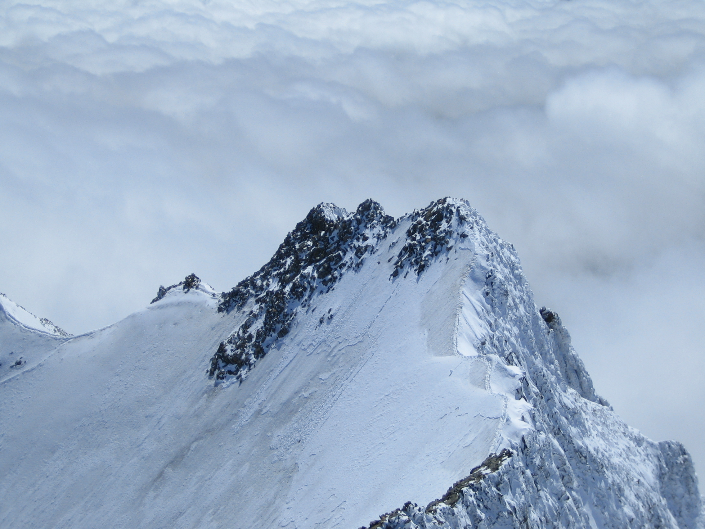 vue de la spelda depuis le piz bernina